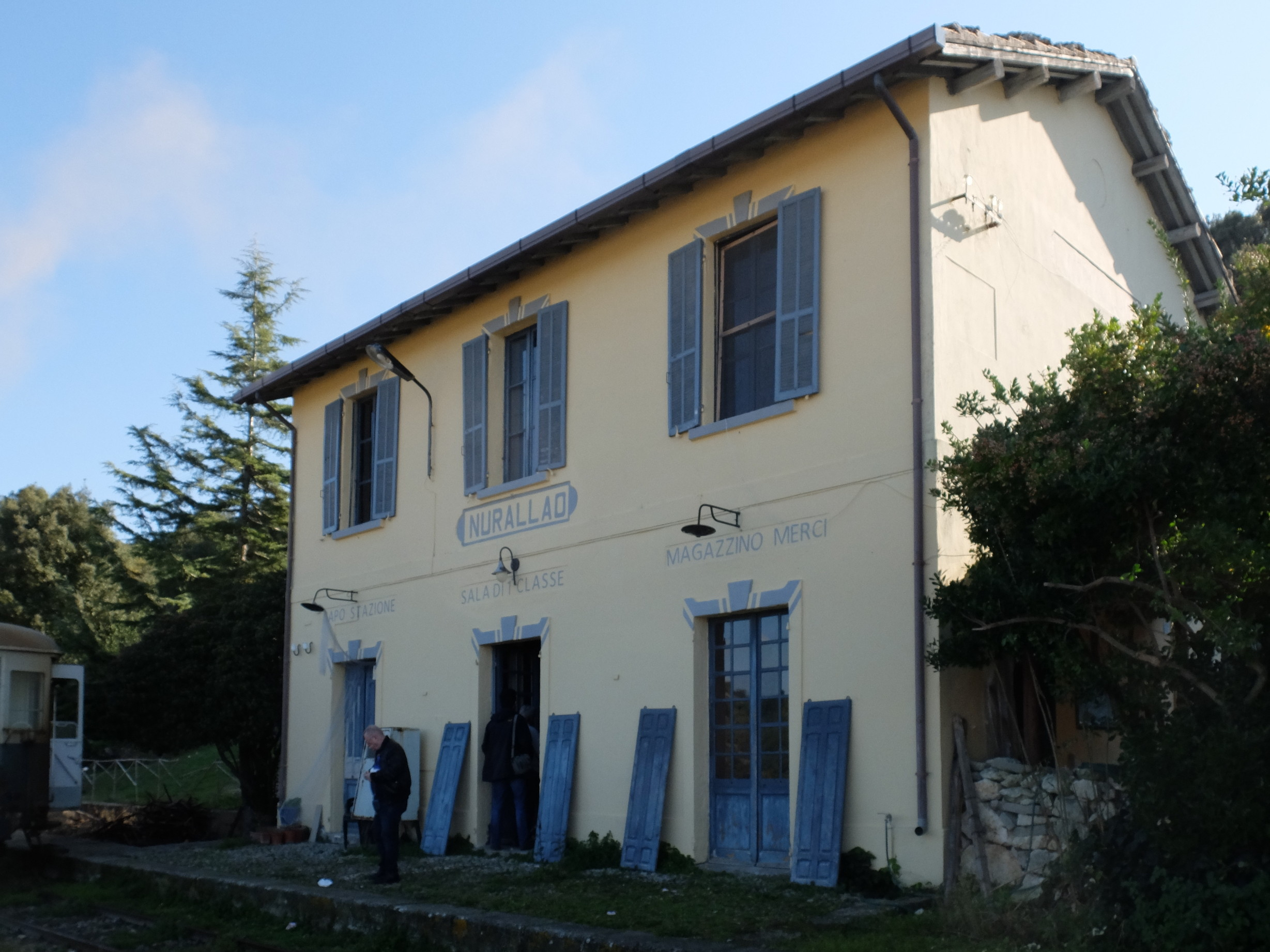 Bahnhof Nurallao an der Strecke Isili–Sorgono